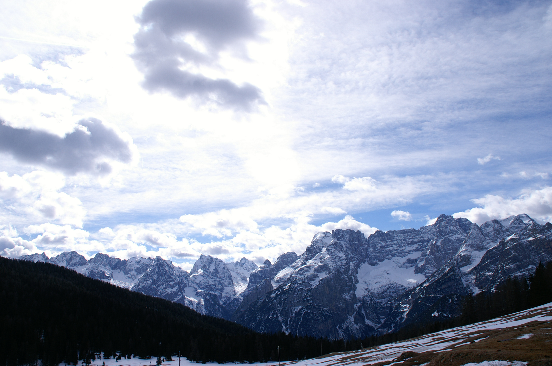 Croda Biana e Cresta degli Invalidi